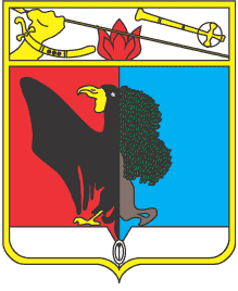 Перший Герб Гайворона - містa в Кіровоградській області